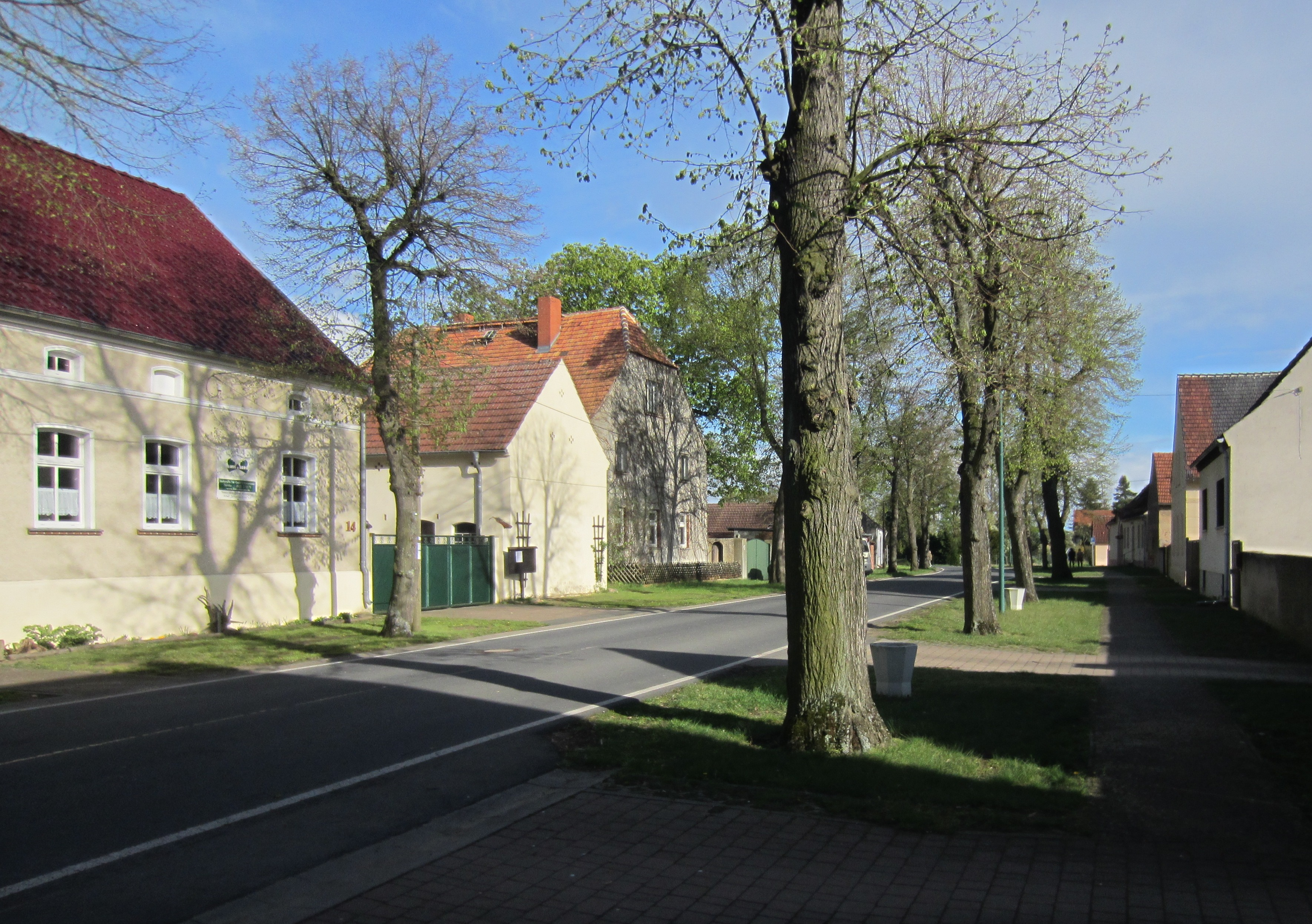 Falkenberg/Elster, Ortsteil Kleinrössen, Dorfstraße